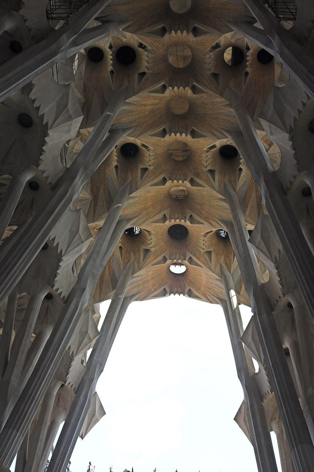 Volta de la Nau Central de la Sagrada Família. (Barcelona-Catalunya)